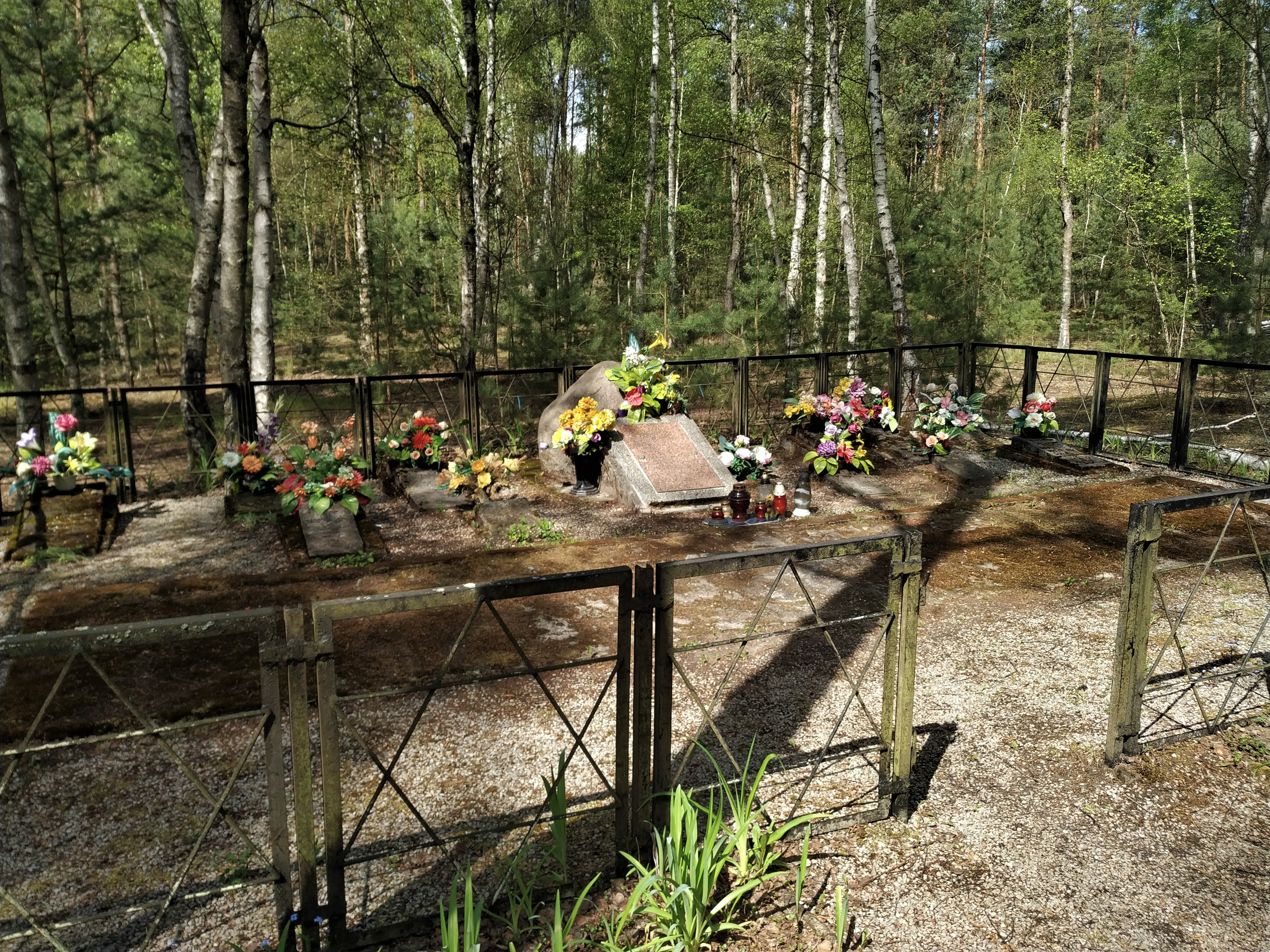 Miejsce upamiętnienia Żydów Łukowa, zamordowanych przez Niemców w latach 1940–1943, na obszarze zbiorowej mogiły w lesie Kierkut